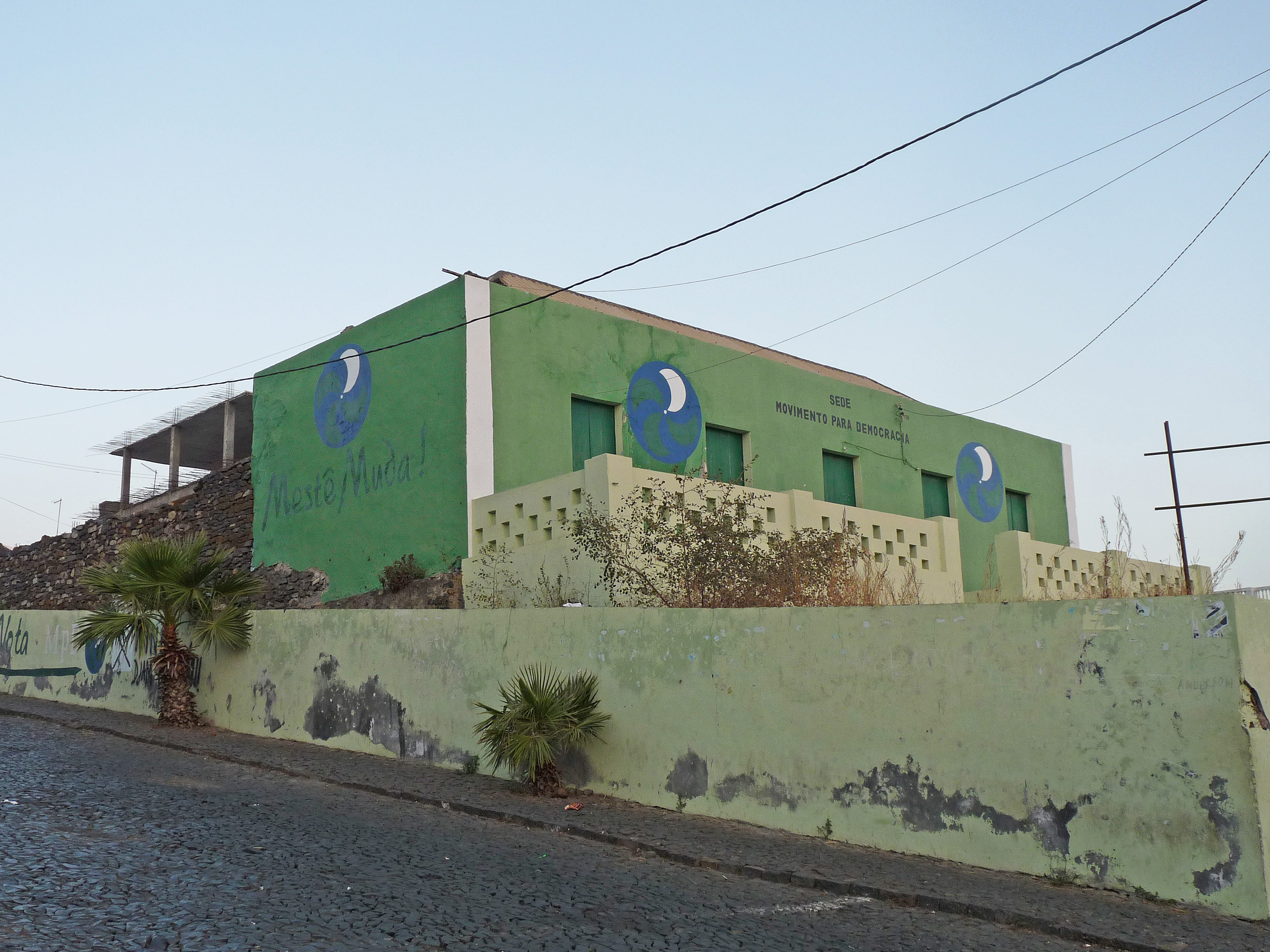 São Filipe (île de Fogo, Cap-Vert) : siège du Movimento para Democracia (MpD)